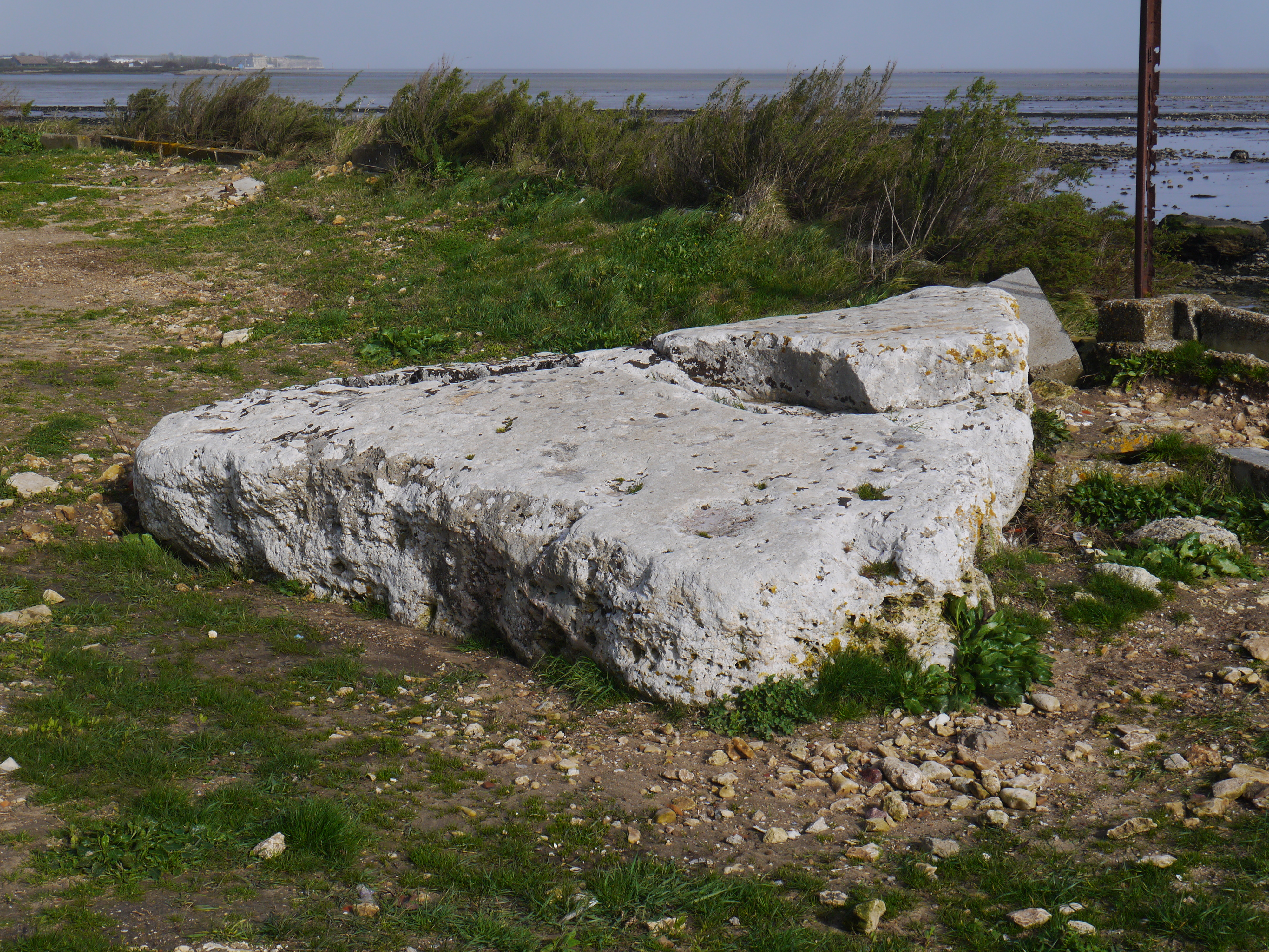 Vue rapprochée.